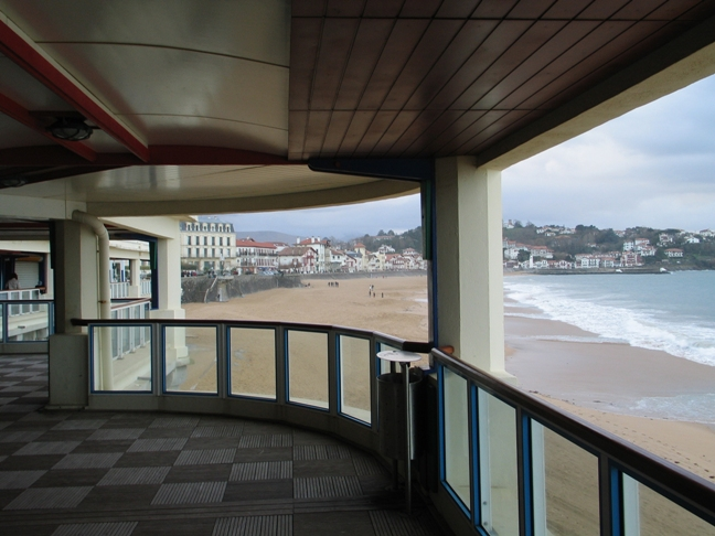 Image Faisans Jean-Luc : Avec son accord